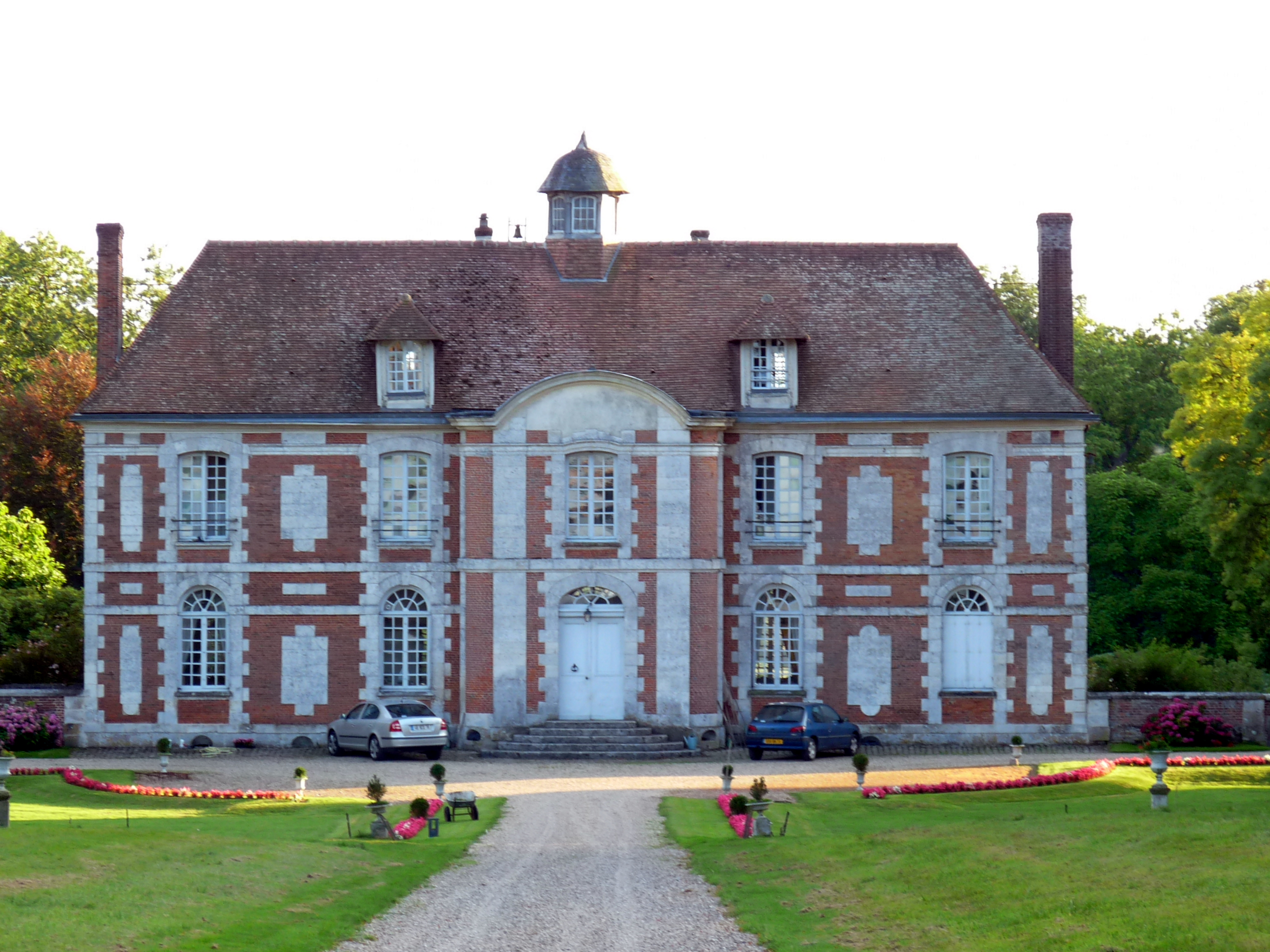 Château de Launay (InscritInscrit) .